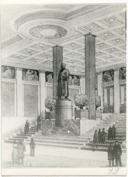 Театр оперы и балета в Минске. Интерьер главного вестибюля